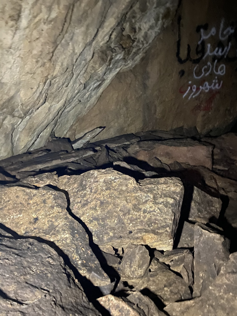 نوشتن یادگاری در دیواره های غار